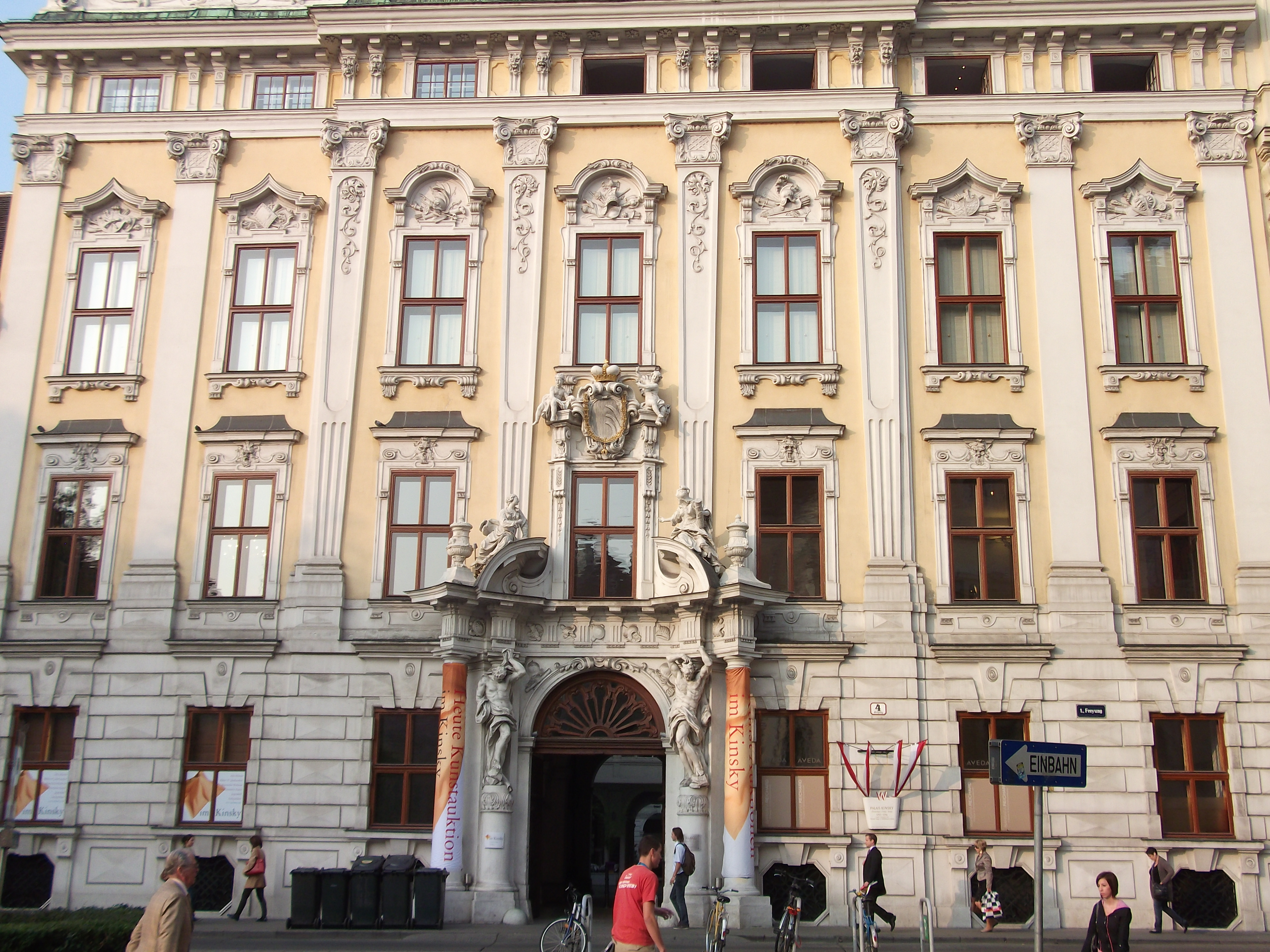 Palais Daun-Kinsky